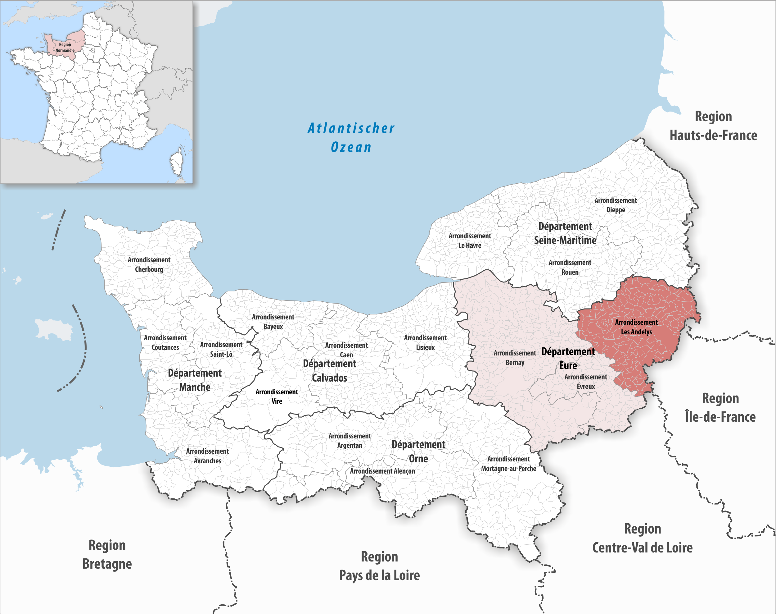 Lage des Arrondissements Les Andelys